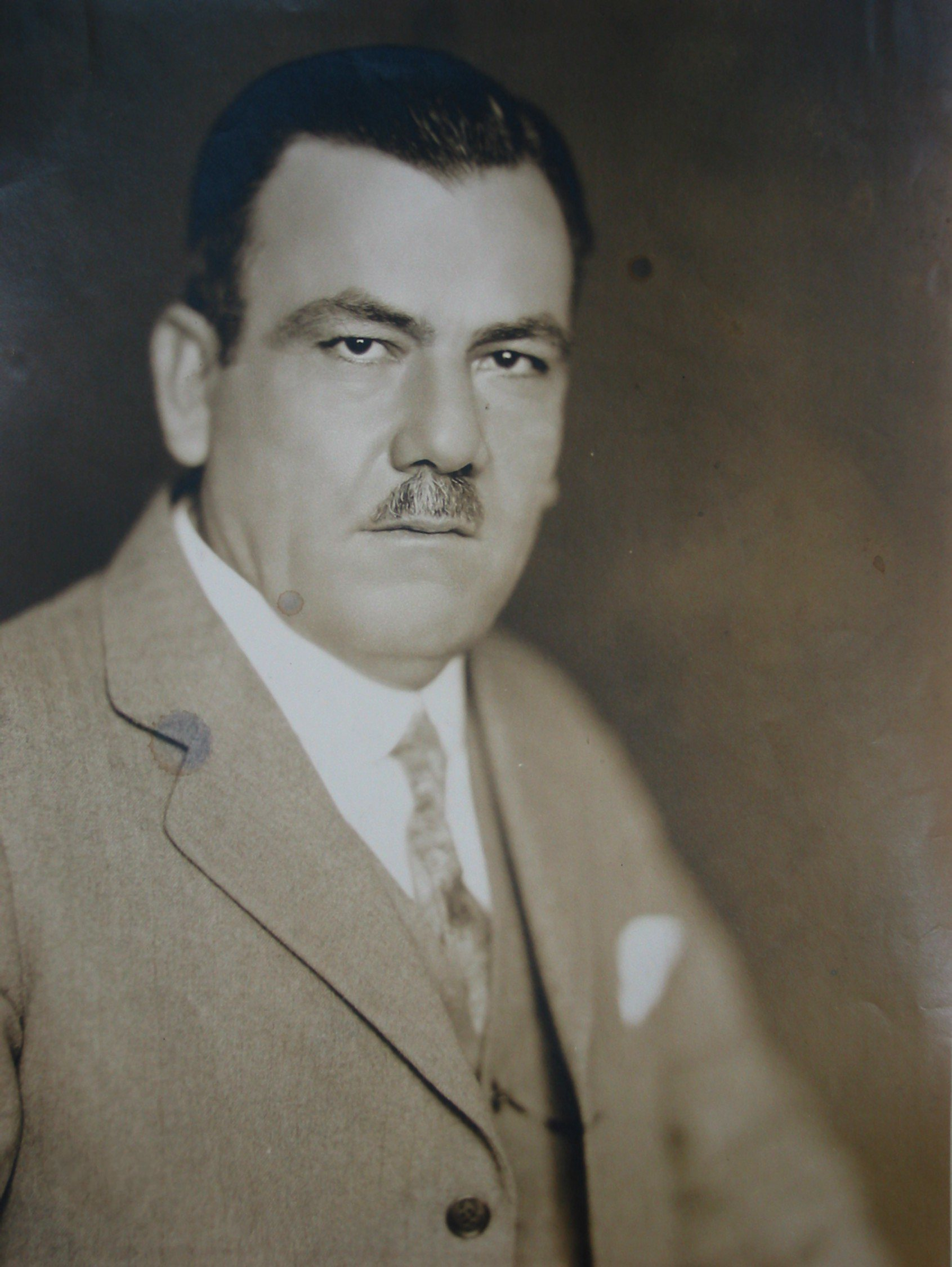 Mexican President Plutarco Elías Calles